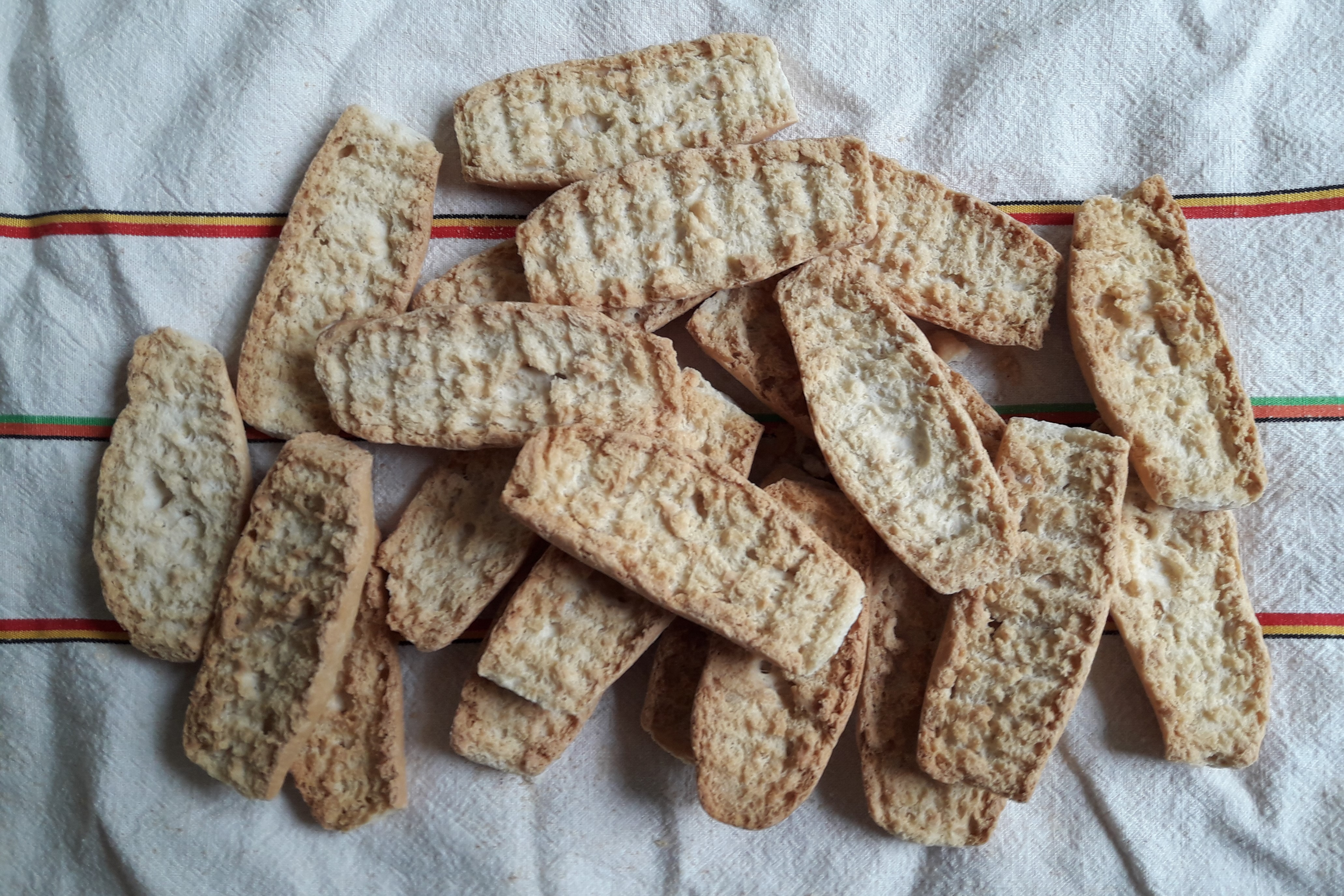 Krisprolls.